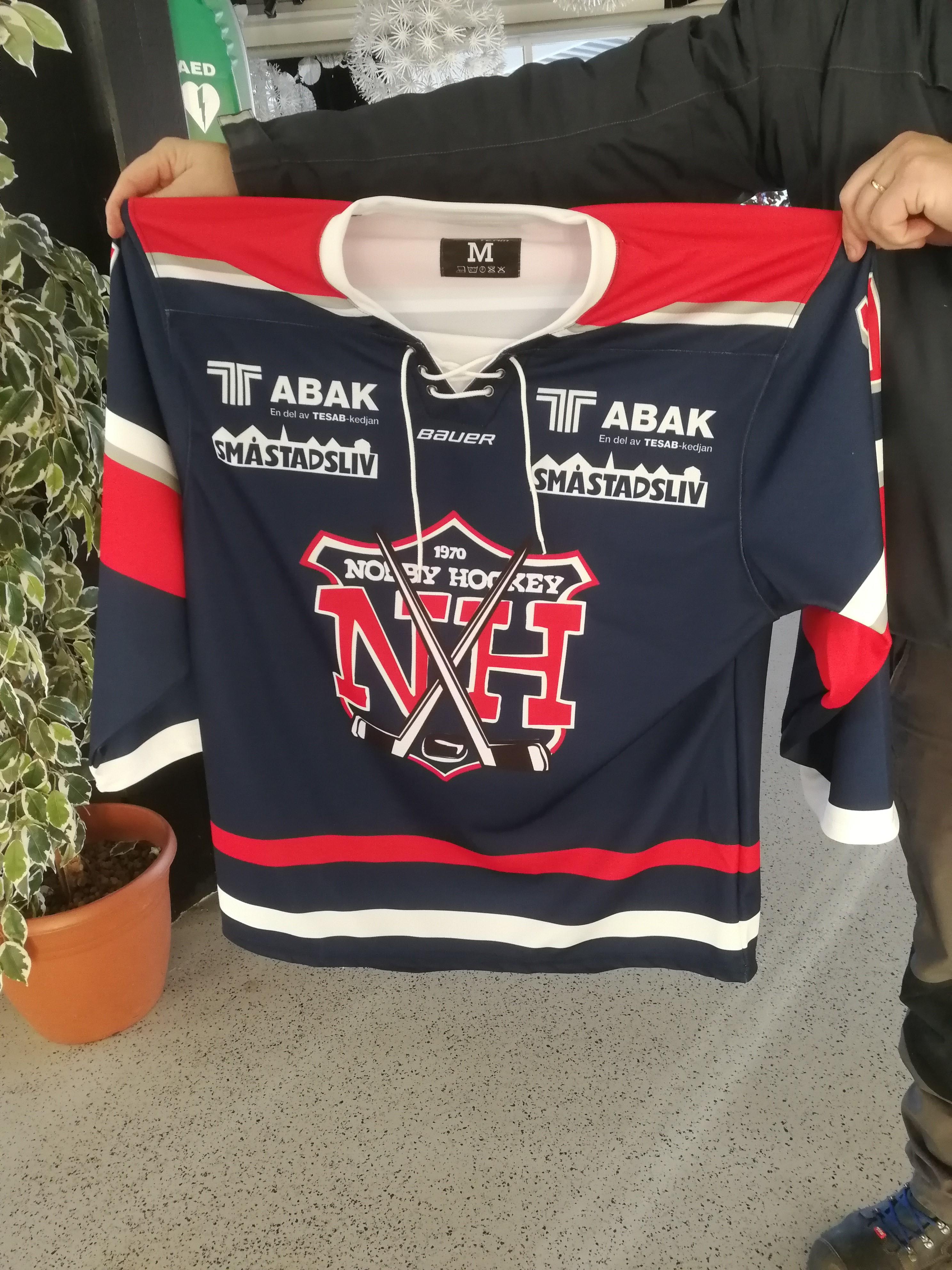 Blå matchtröja - framifrån